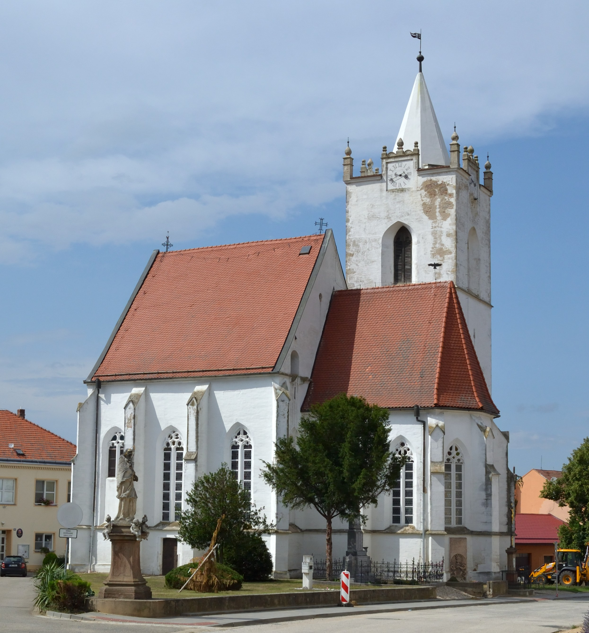 Pouzdřany - kostel svatého Mikuláše a Václava